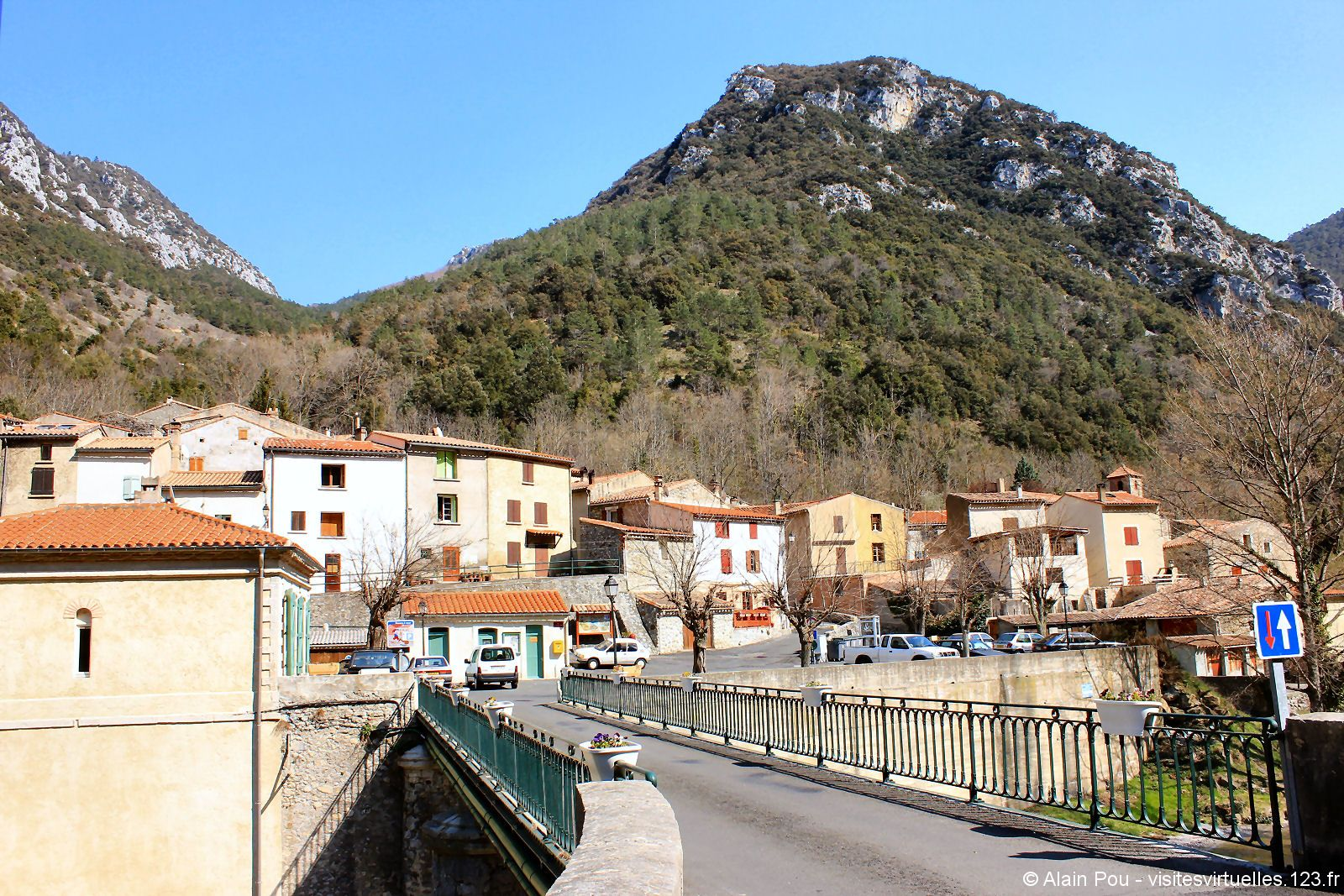 Village de Saint Martin Lys